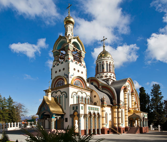 Храм Святого Владимира на Виноградной горе. camera: 5d MKII lenses: 16-35mm f/2.8 L